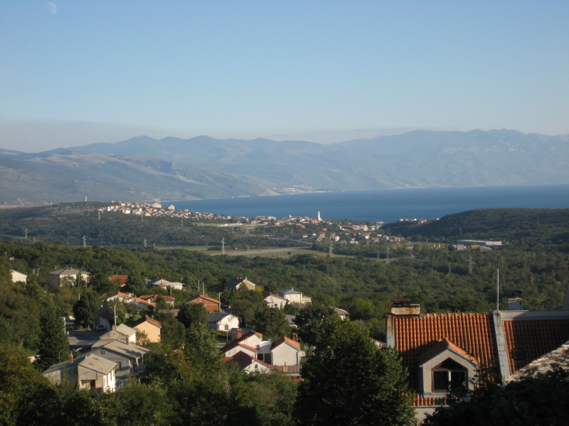 pogled na Novi Vinodolski i Velebit iz Bribira, Croatia